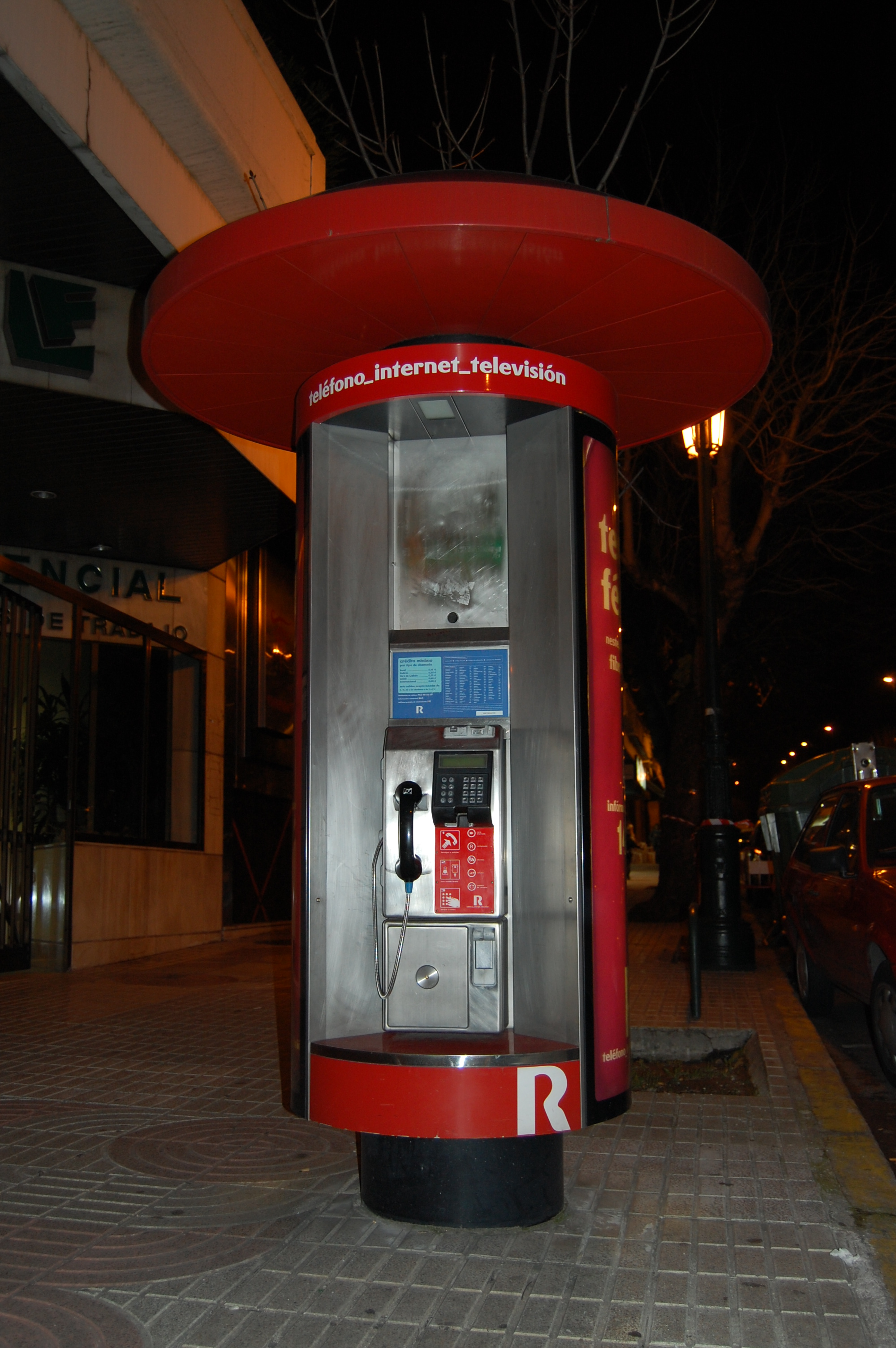 Cabina de telefone público da operadora galega Mundo-R na avenida Gran Vía de Vigo.